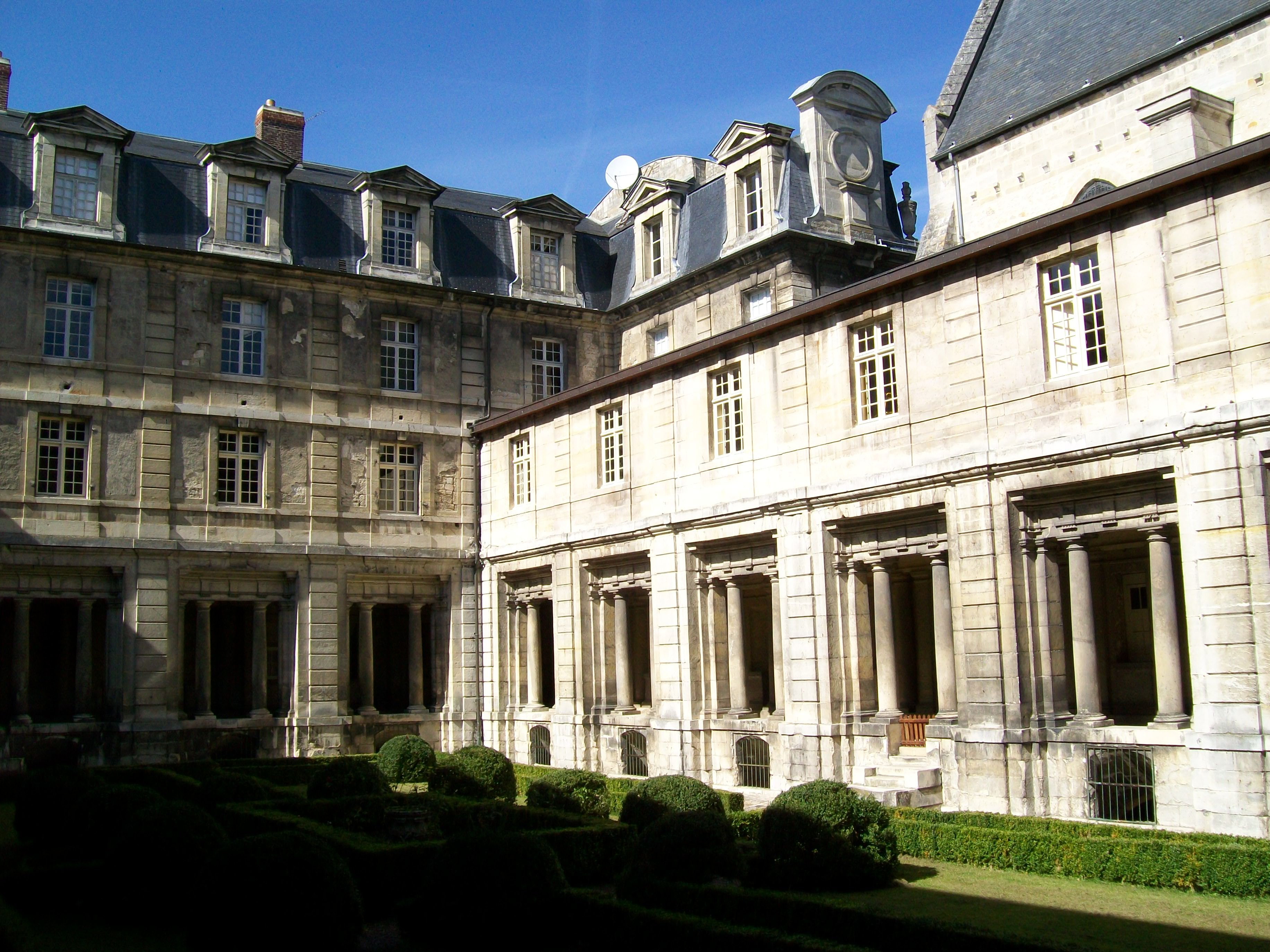 Cloître de l'ancienne abbaye Saint-Vincent, XVIIe siècle.